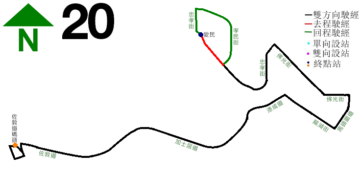 中文（香港）: 九巴20線在1983年取消前的走線圖